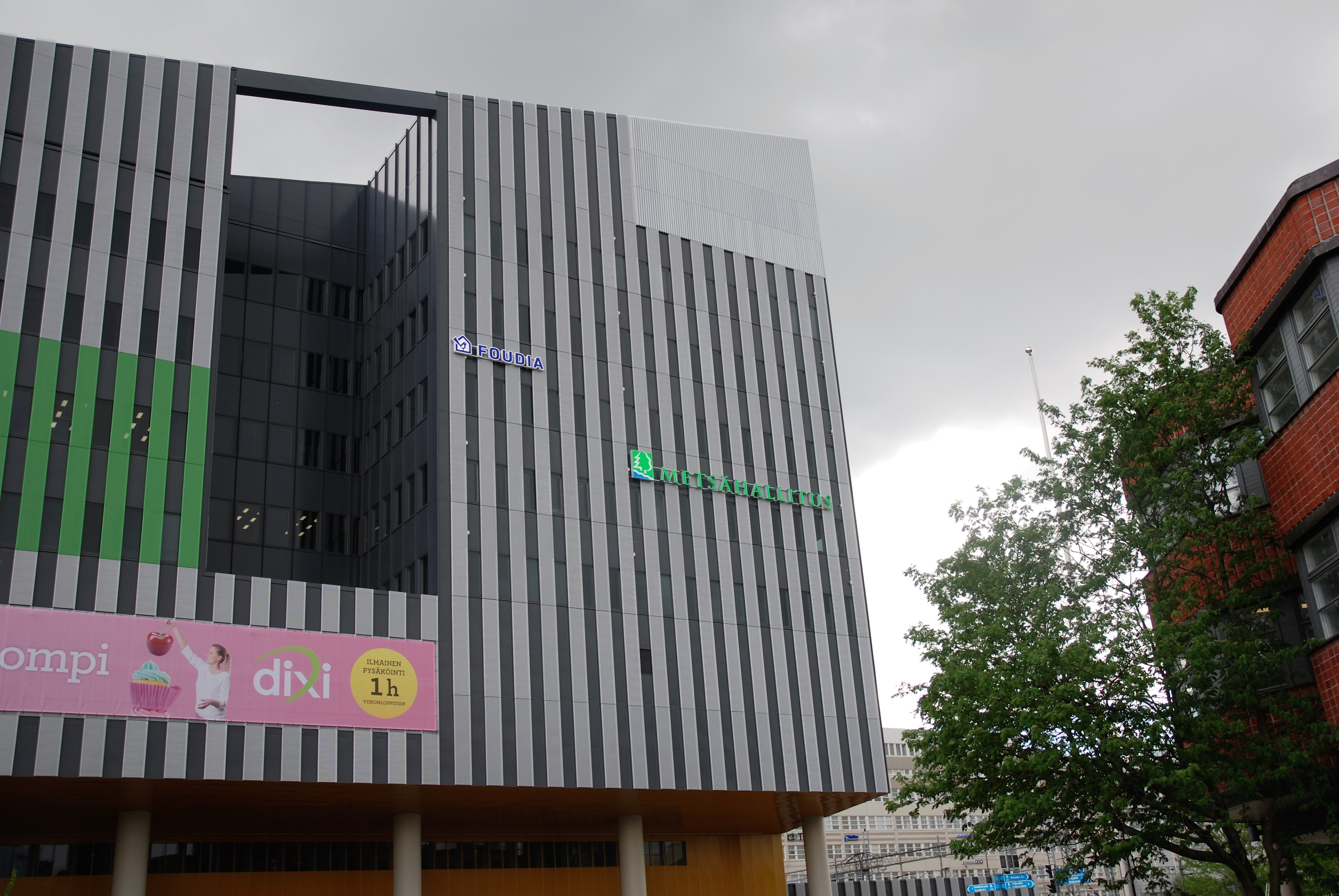 Metsähallituksen pääkonttori sijaitsee Tikkurilan kauppakeskus Dixissä, aivan juna-aseman yhteydessä.